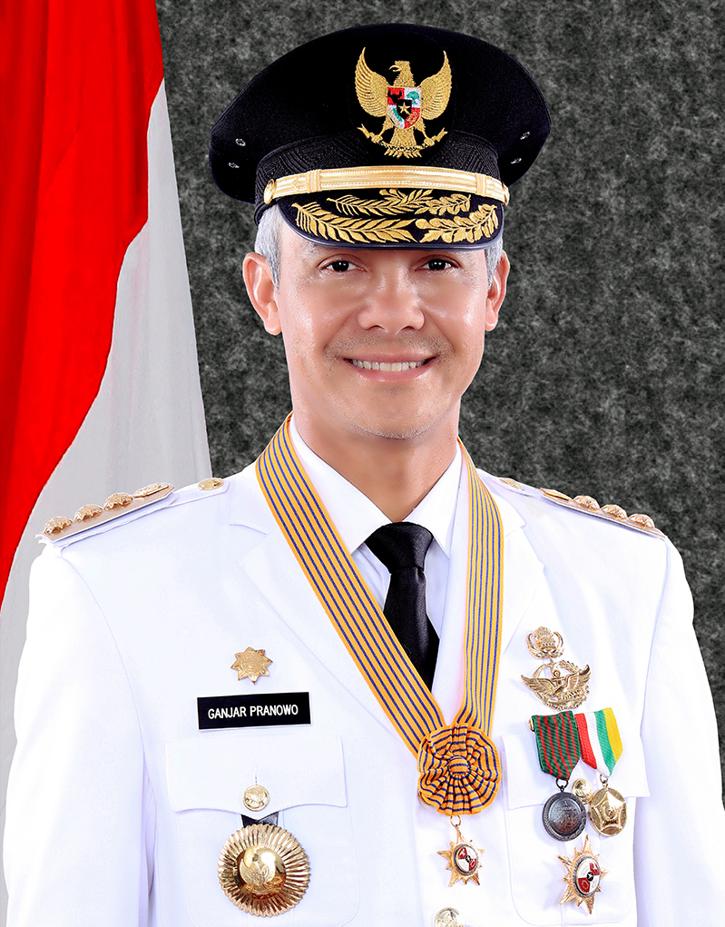 Ganjar Pranowo sebagai Gubernur Jawa Tengah